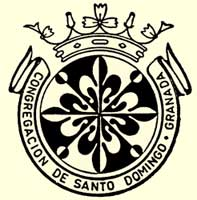 Escudo Congregación de Santo Domingo